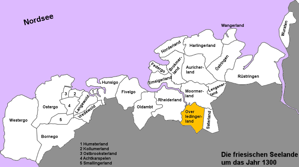 Karte der freien friesischen Seelande (Landesgemeinden) von der Zuiderzee bis zur Weser in den Grenzen um das Jahr 1300, das Overledingerland hervorgehoben. (Karte ohne Inseln.)